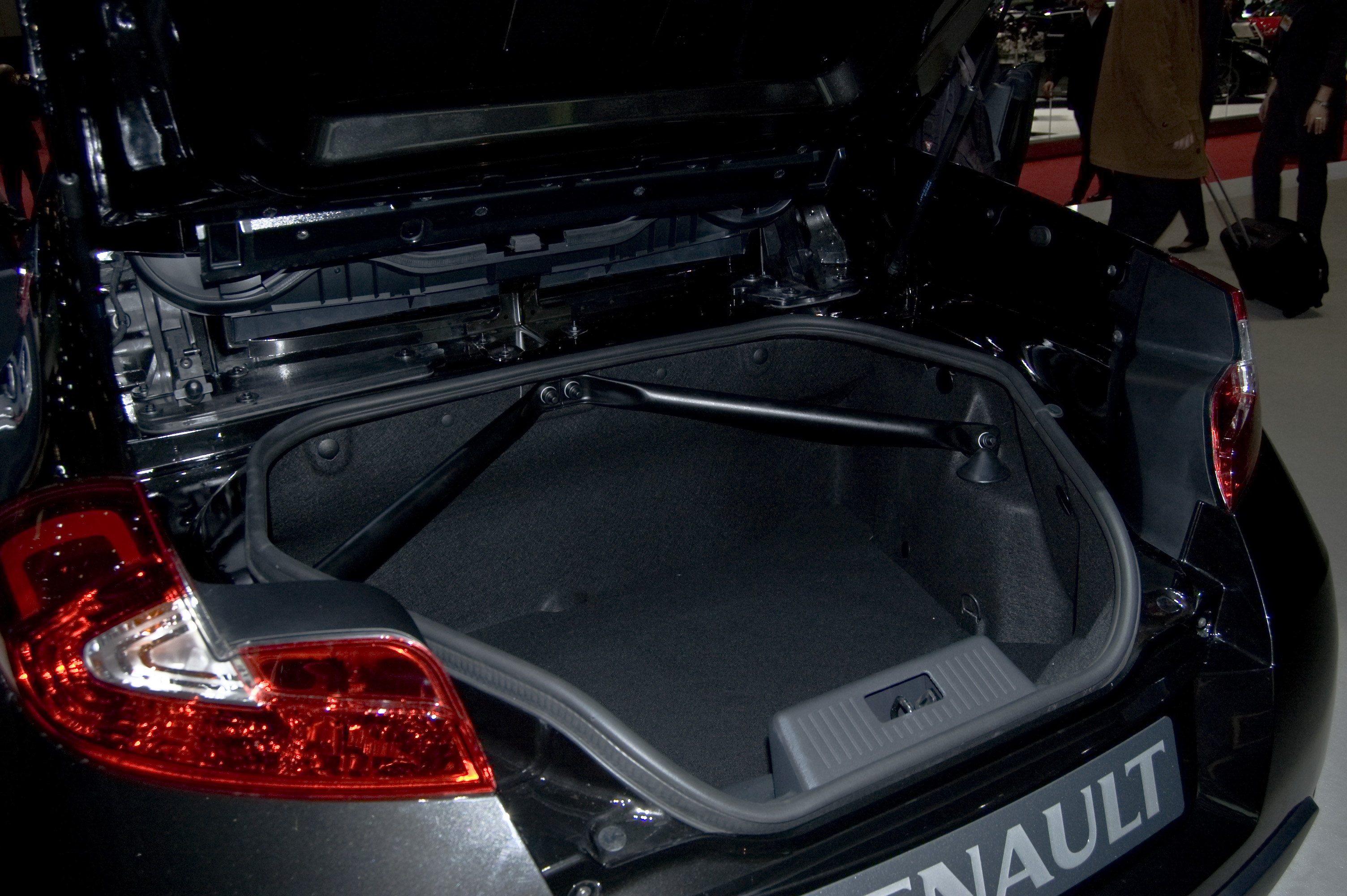 Renault Wind en el Salón de Ginebra 2010.